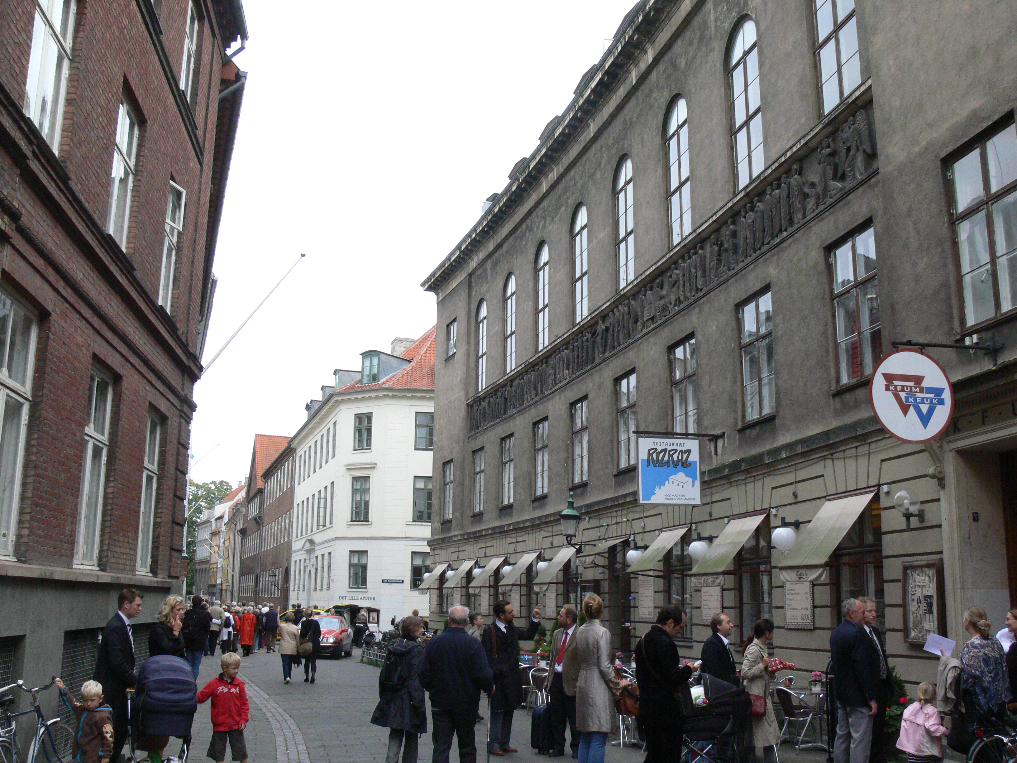 Store Kannikestræde in Kopenhagen